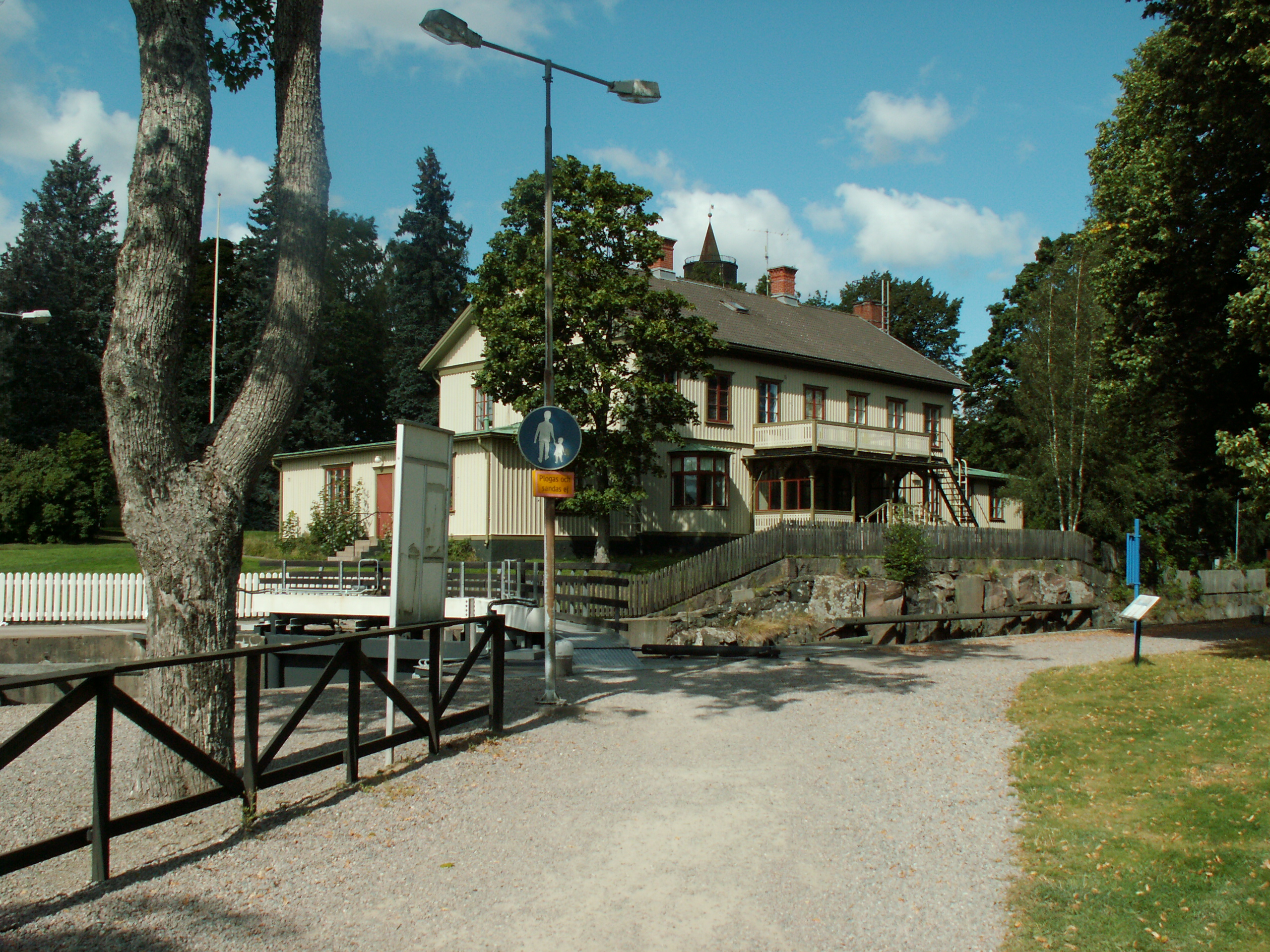 Villa ved strandpromenaden.